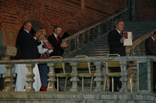 Mauro Felicori, Premio dell’Unione europea/EUROPA Nostra per la conservazione del patrimonio culturale, Svezia, 2006